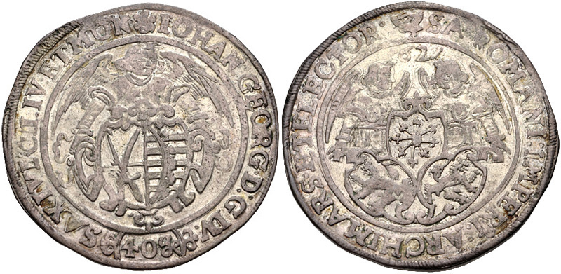 GERMANY, Sachsen-Albertinische Linie (Kurfürstentum). Johann Georg I. 1611-1656. AR 40 Kipper Groschen (43mm, 22.78 g, 10h). Dresden mint. Dated 1621. Angel bearing coat-of-arms / Two angels bearing trilobe coat-of-arms. Rahnenführer 130 var. (obverse legend stops). Near VF, toned.